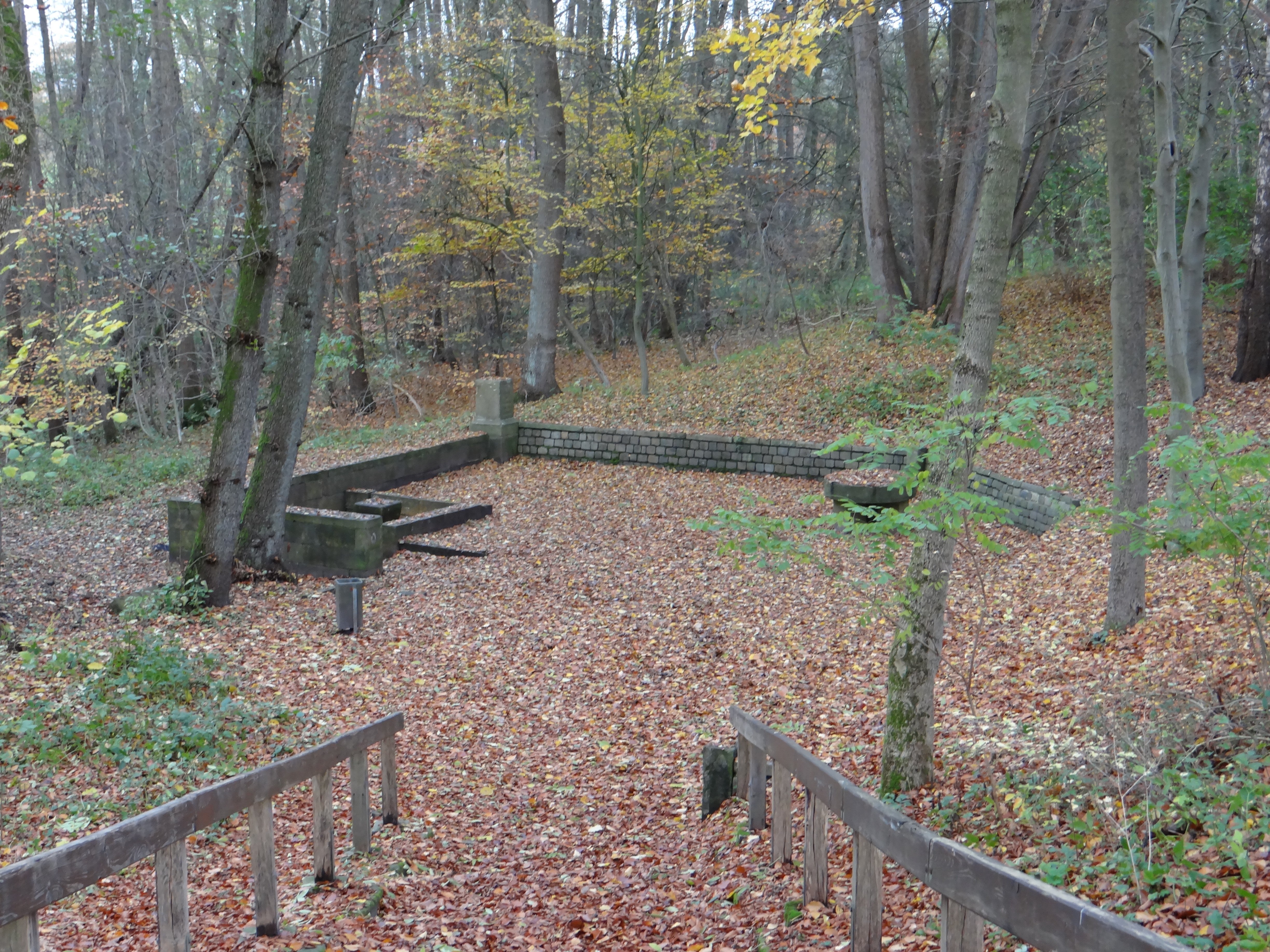 Verdener Brunnen, Gesamtansicht im Herbst